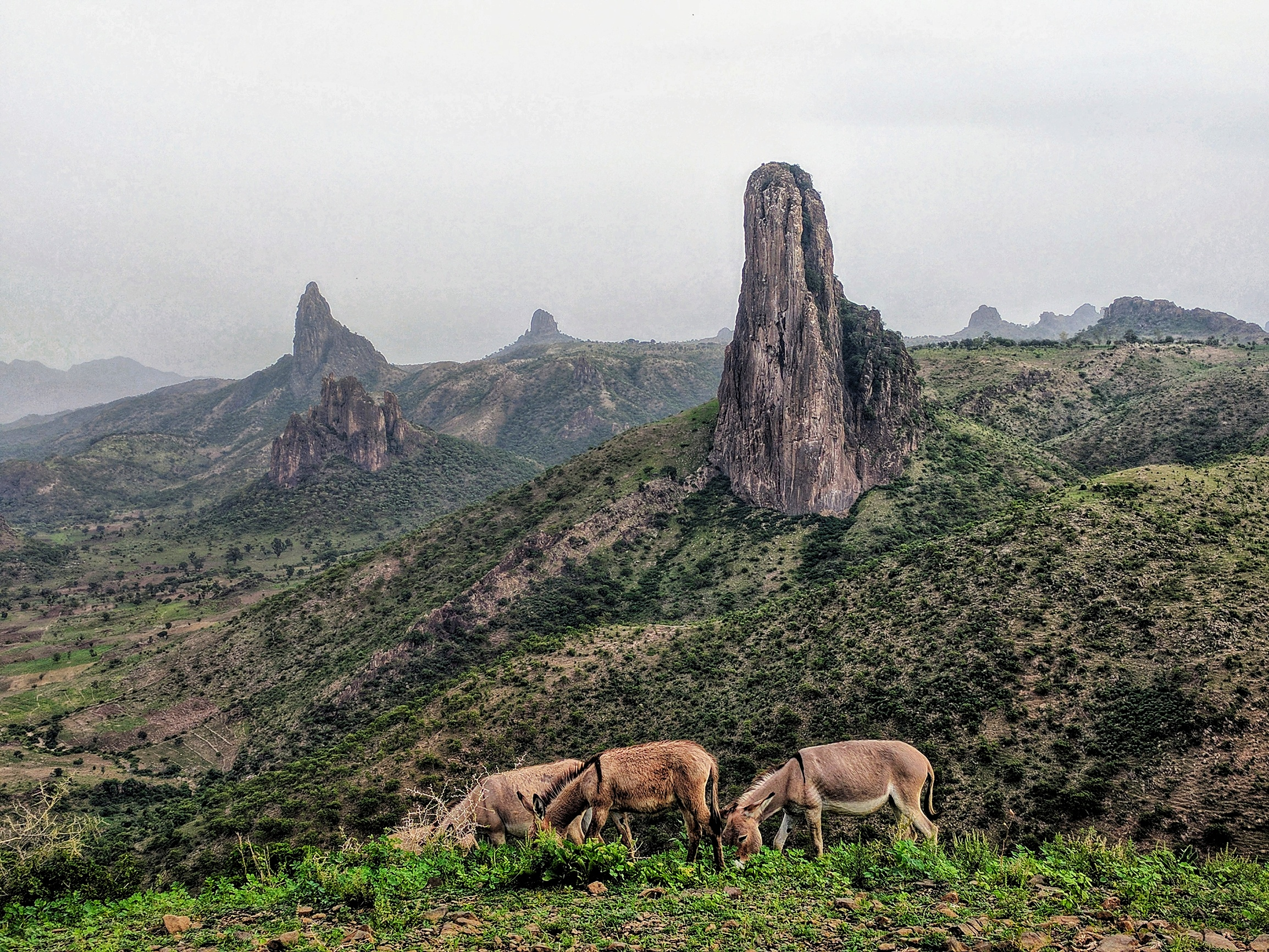 Les monts Kapsiki situés dans le Mayo-Tshanaga avec l'emblématique pic de Rhumsiki. Localisation : Mayo-tshanaga, Extrême-Nord